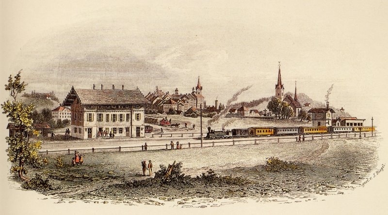 Bahnhof Wil